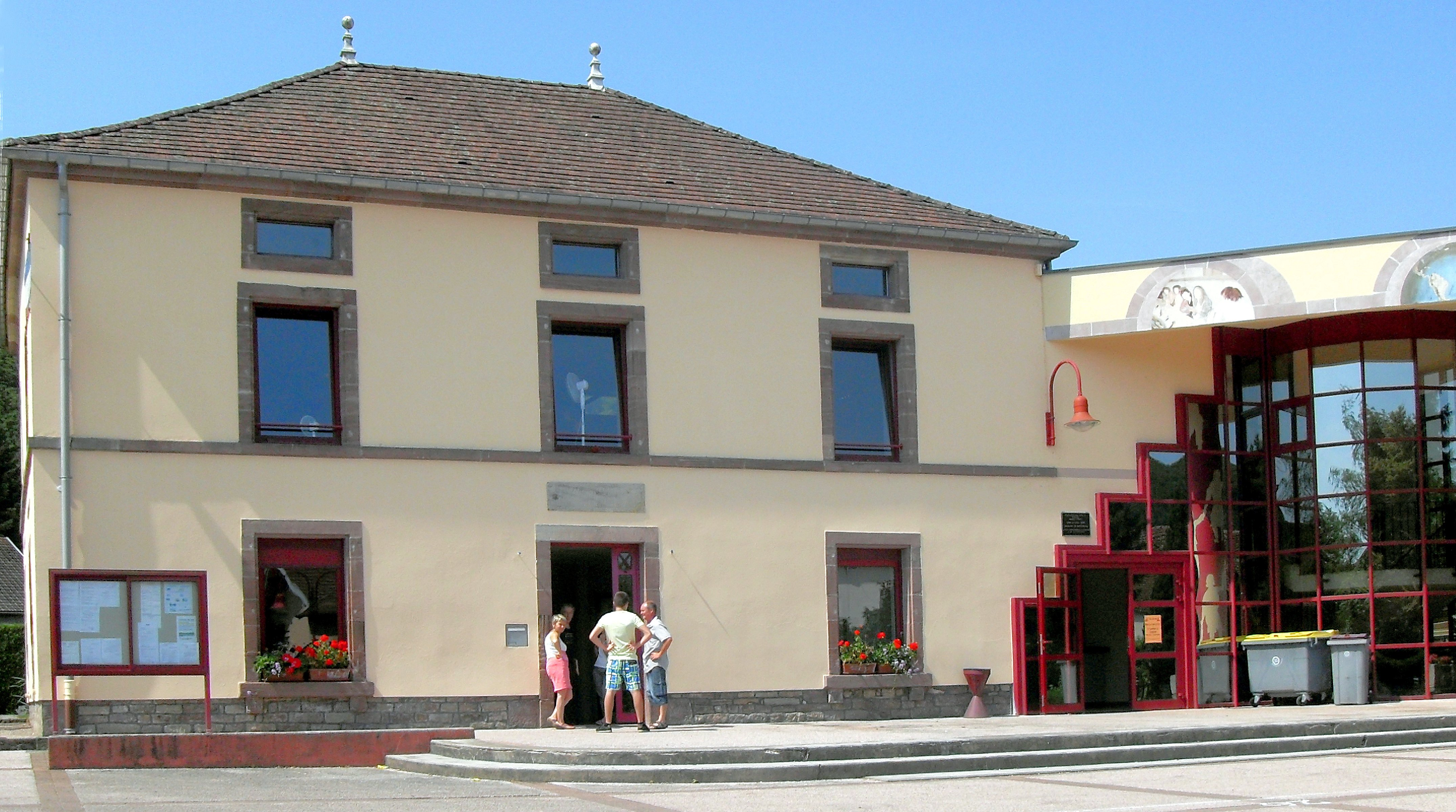 La mairie de Breuchotte